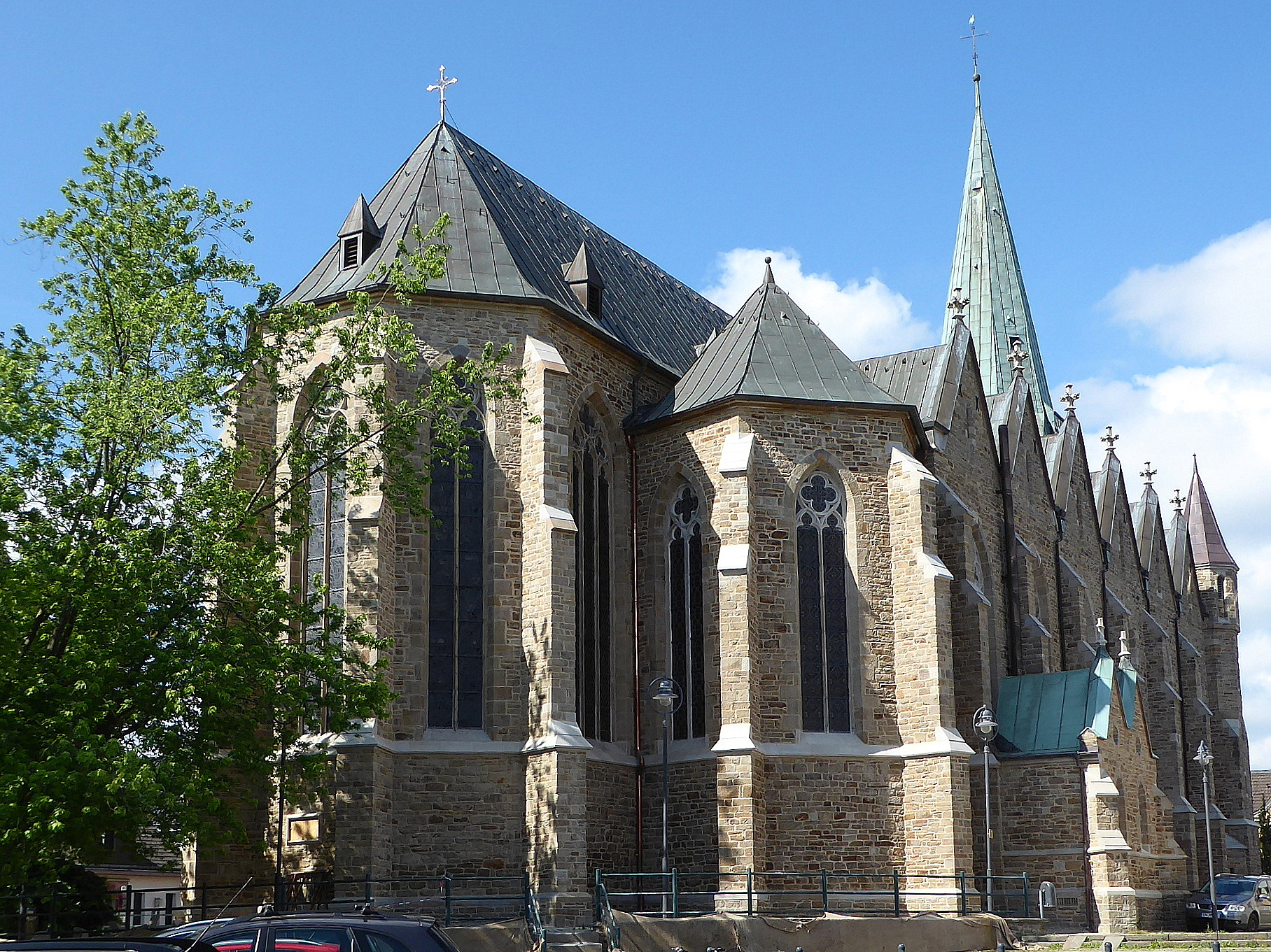 Umfassende Sanierung der Außenfassaden nach drei Jahren im Mai 2017 abgeschlossen. Ostansicht